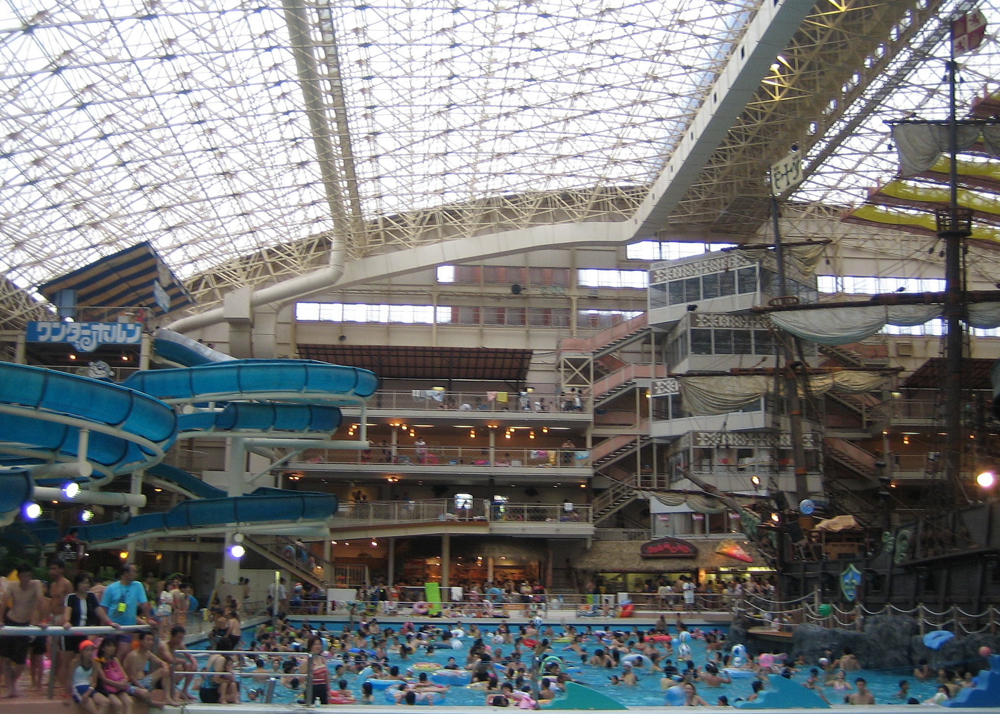 Spa Resort Hawaiians, Iwaki-shi, Fukushima-ken, Japan